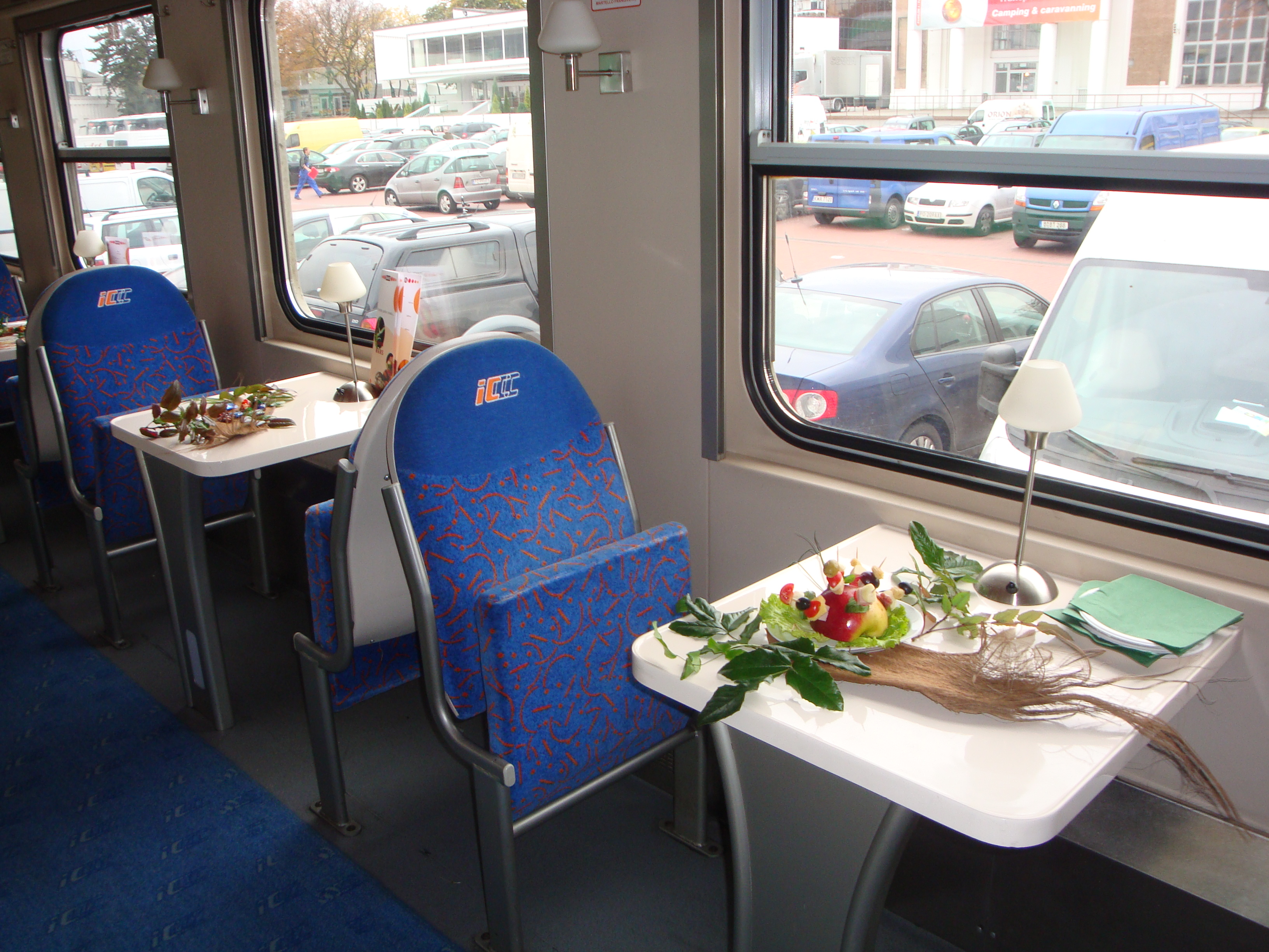 Wnętrze wagonu restauracyjnego prezentowanego podczas targów Tour Salon w Poznaniu.